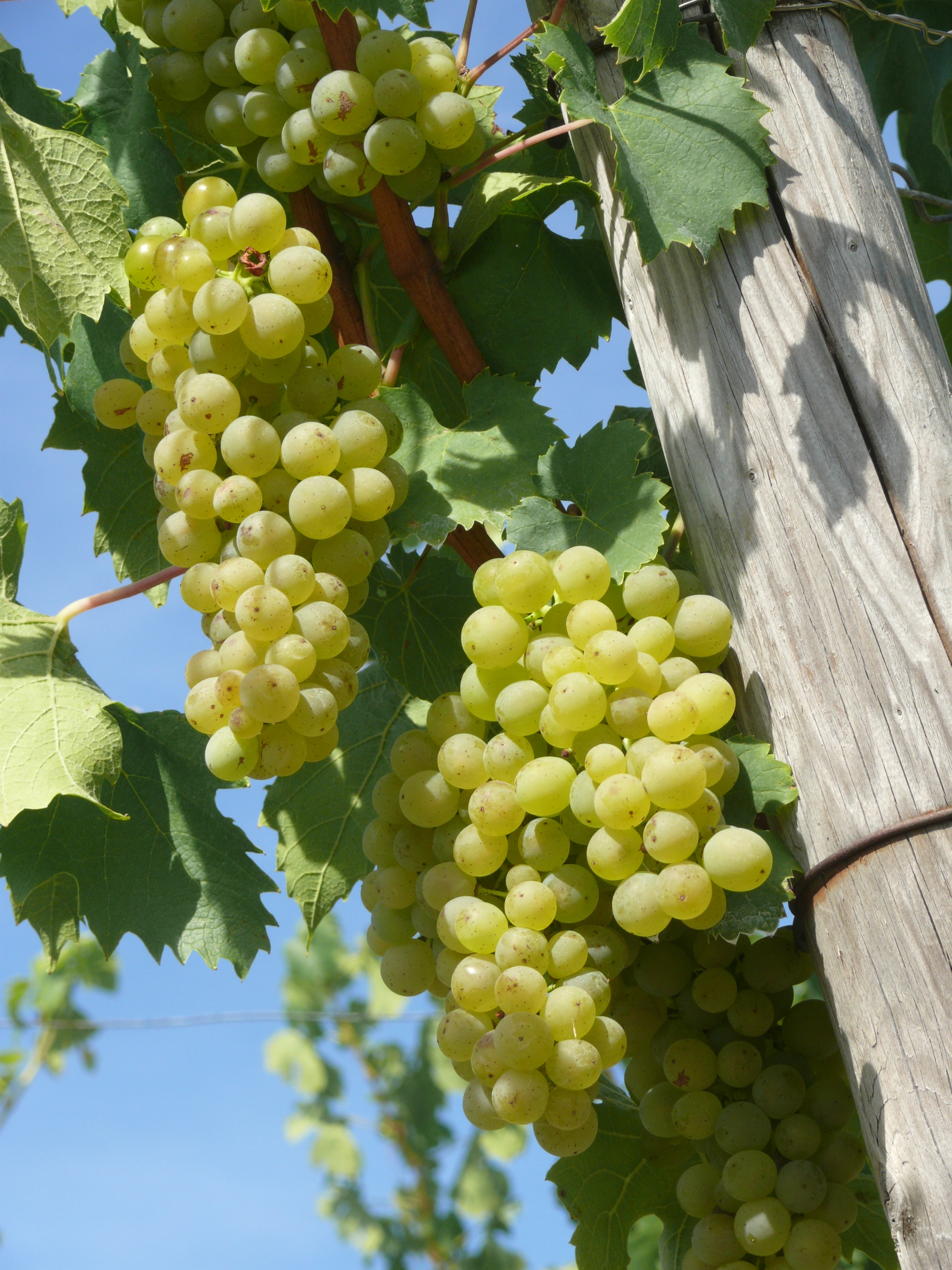 Silvaner, Tauberland